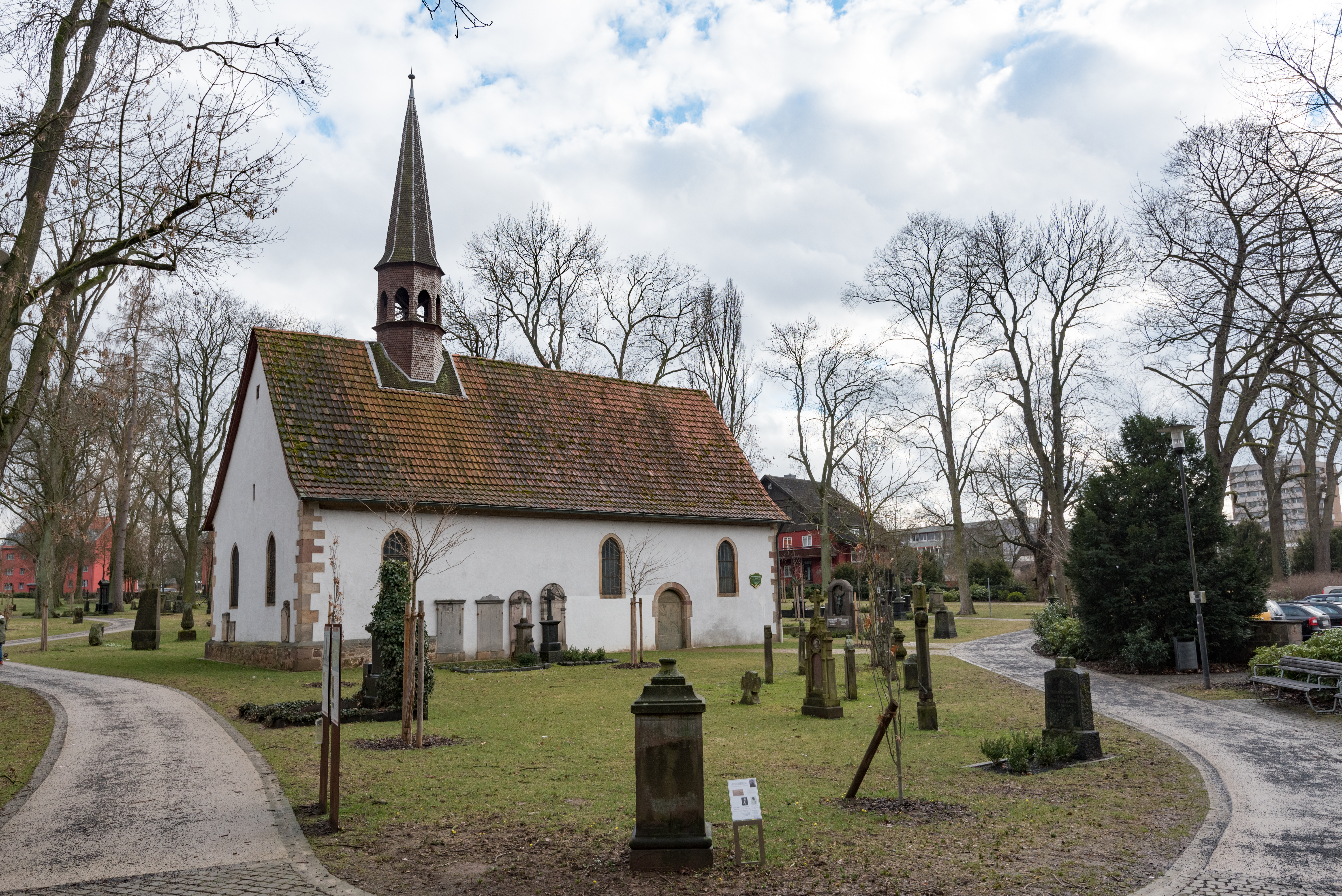 Fulda, Goethestraße, Alter städtischer Friedhof